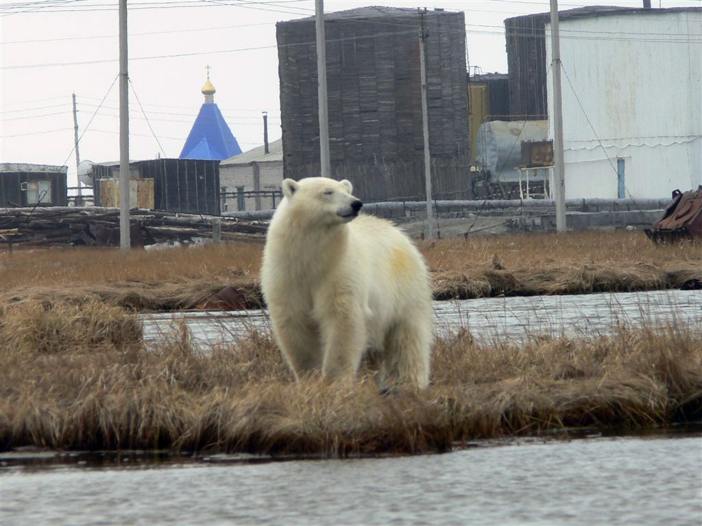 Ursus maritimus